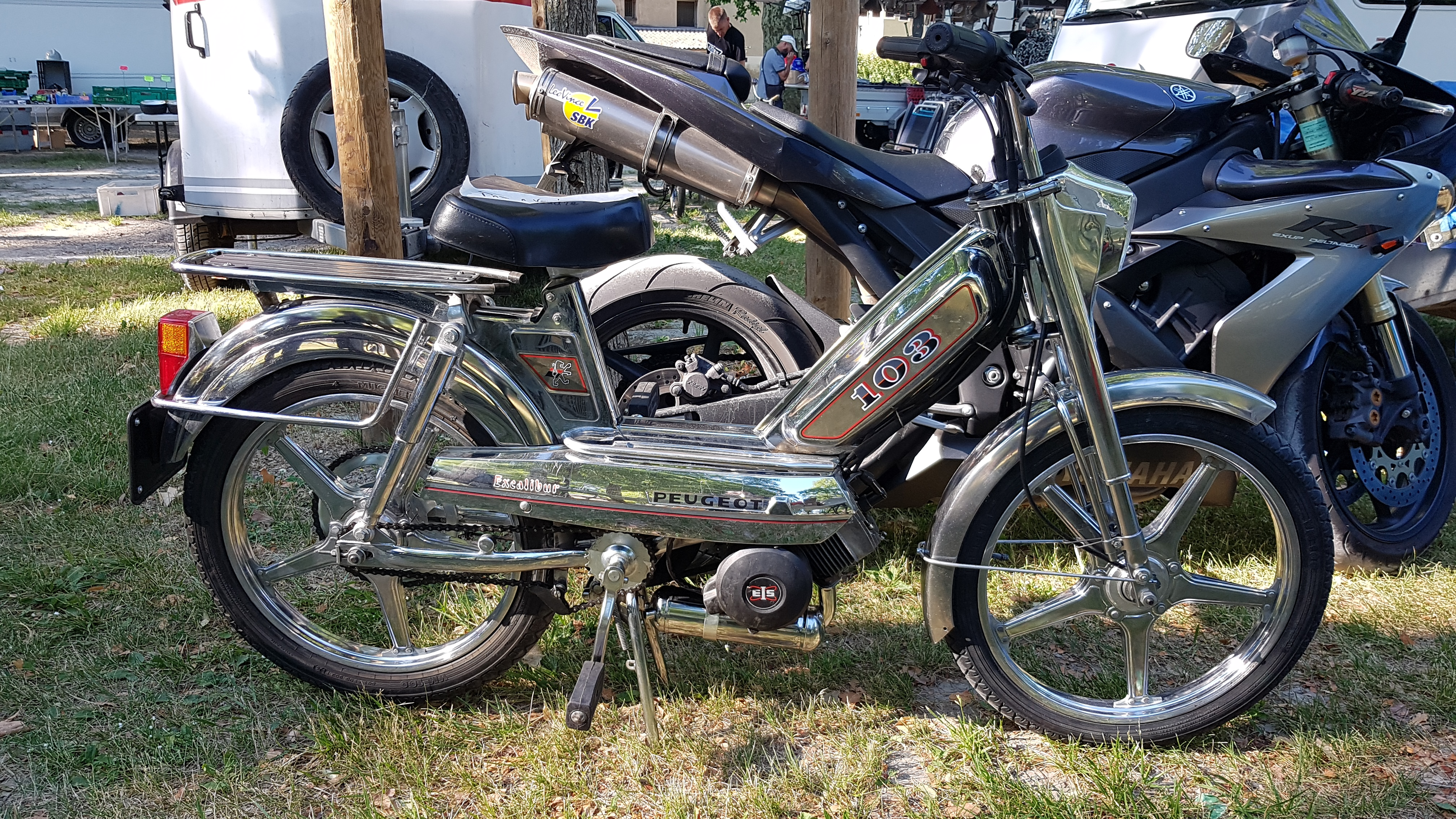 Modèle d'origine entièrement chromé